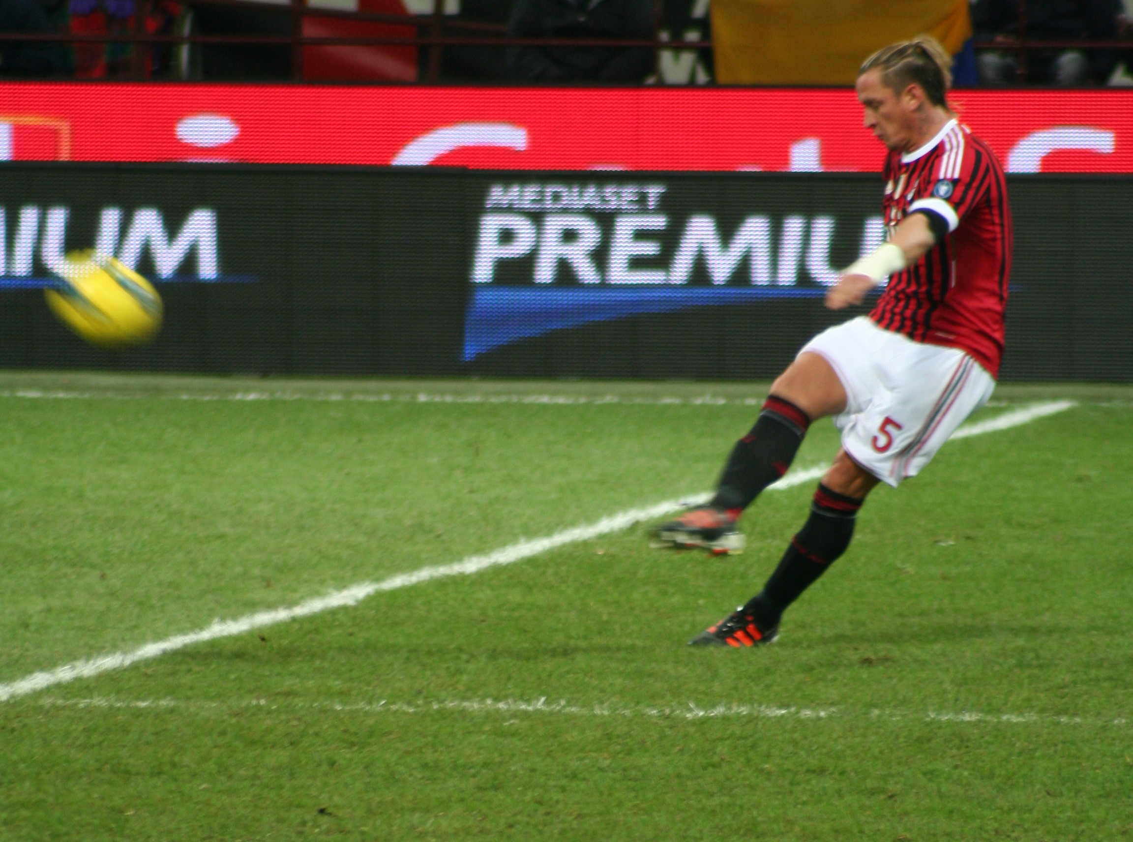 Mexes crossa. Partita Milan-Siena stagione 2011-2012